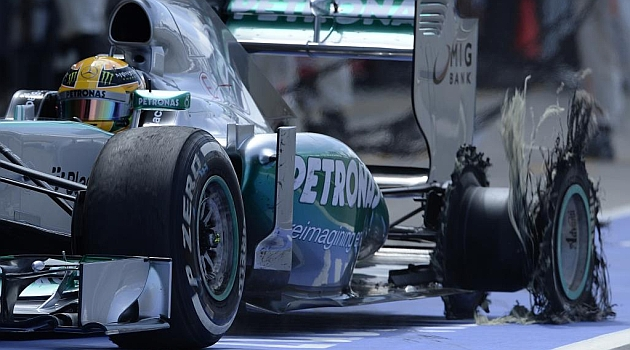 Pinchazo de la rueda trasera izquierda del Mercedes de Lewis Hamilton.